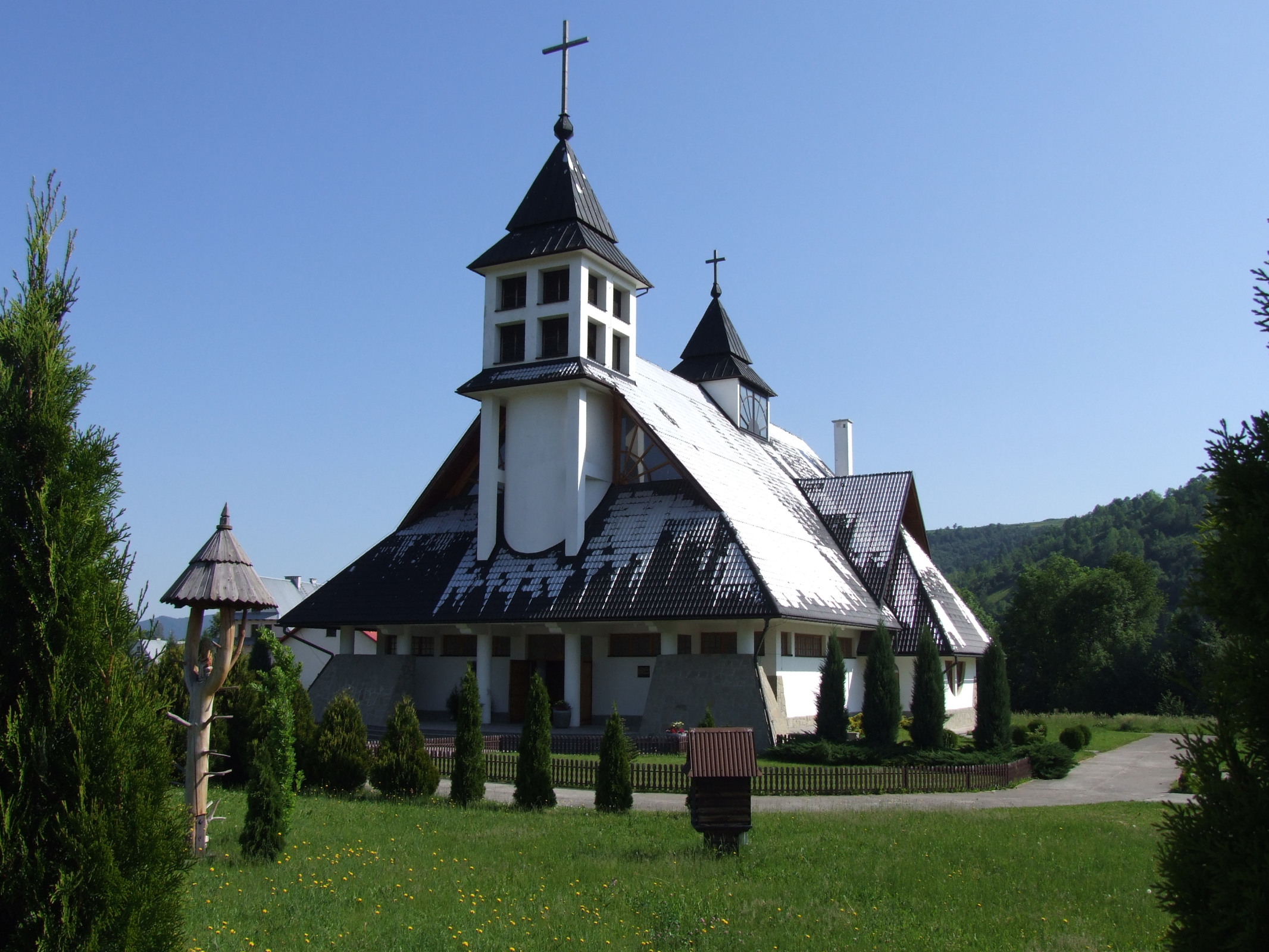 Nowy kościół w Niedźwiedziu (powiat limanowski)